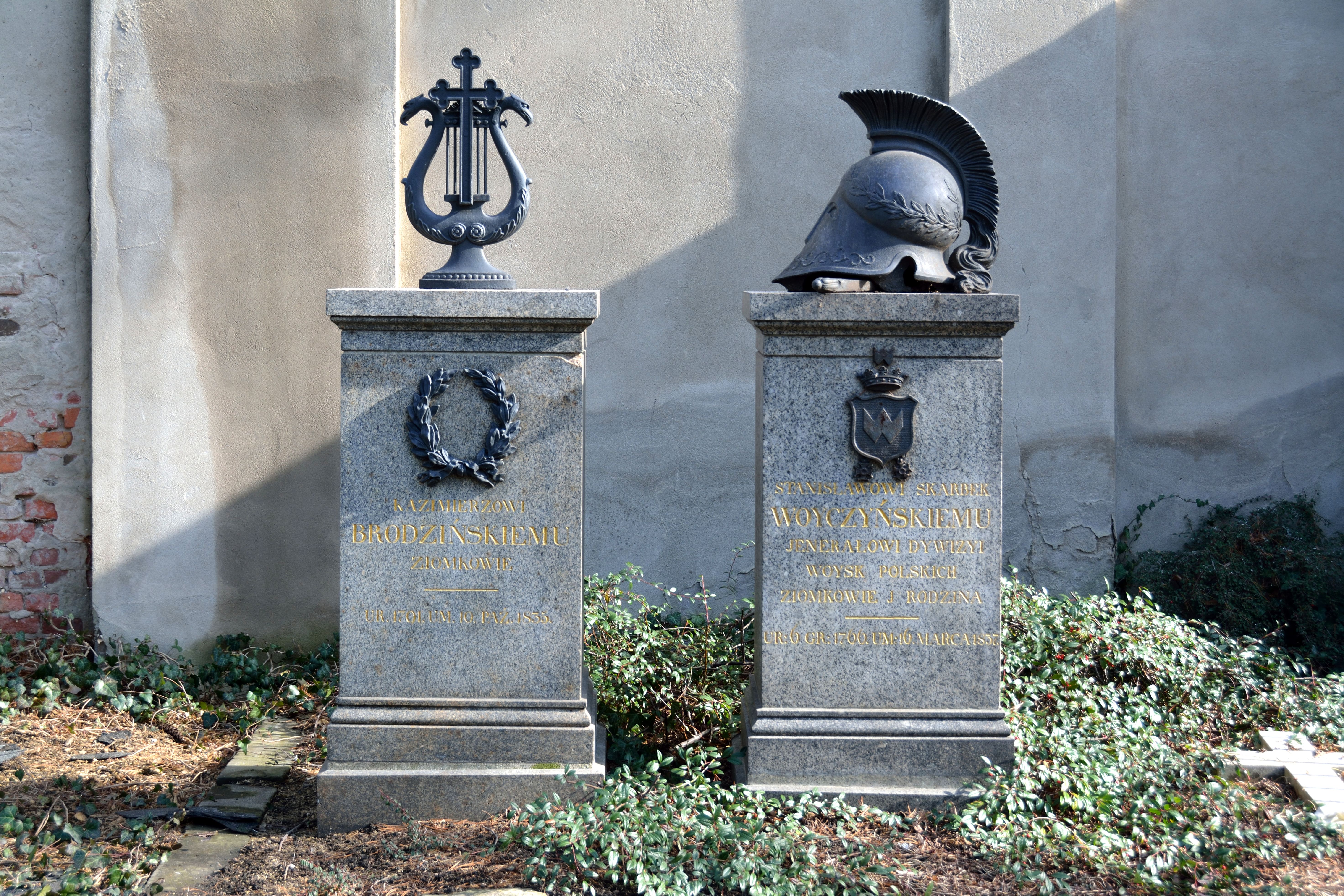 Impressionen vom alten katholischen Friedhof in Dresden